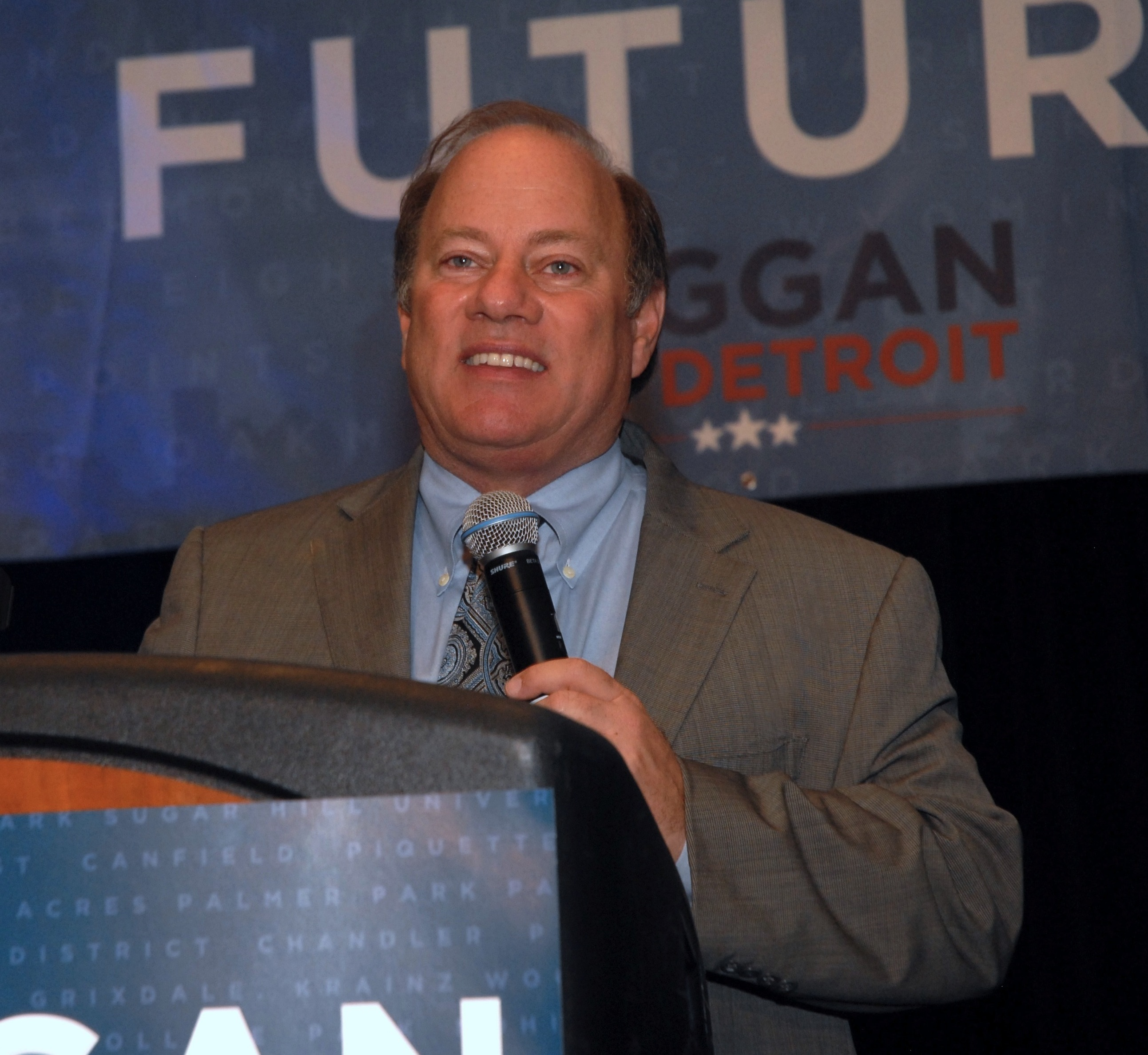 Detroit mayoral candidate Mike Duggan, 2013.